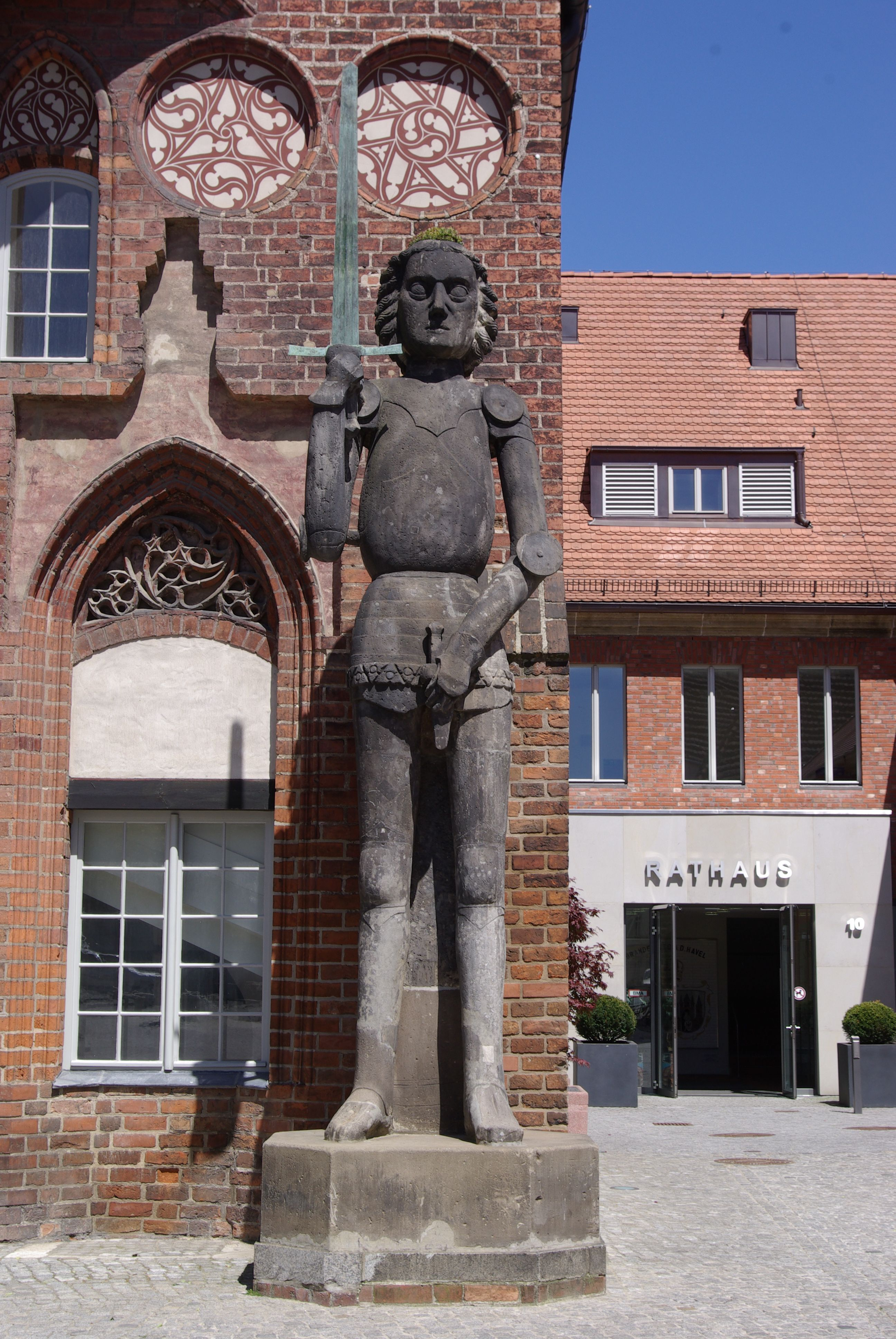 Brandenburg an der Havel, Stadtteil Altstadt. Der Roland stammt ursprünglich aus der Neustadt, wurde aber 1946 vor das Altstädter Rathaus versetzt. Errichtet wurde er 1474, im Laufe wurde die Figur aber mehrmals renoviert.